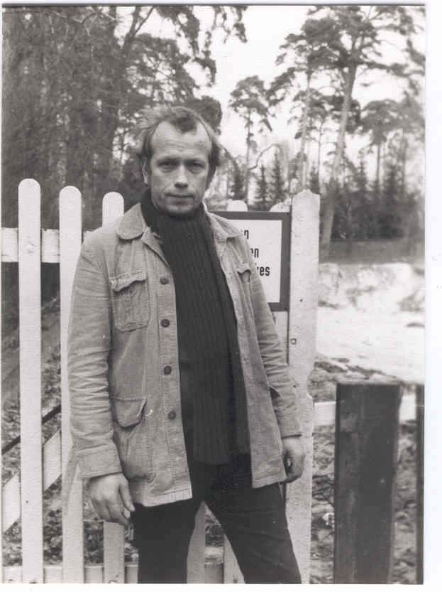 Nicolas Born 1969 in Nürtingen